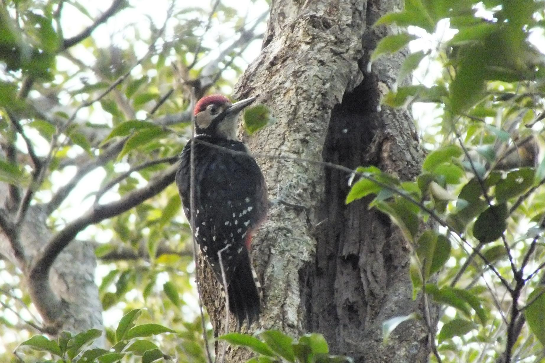 2012年12月7日 奄美大島にて